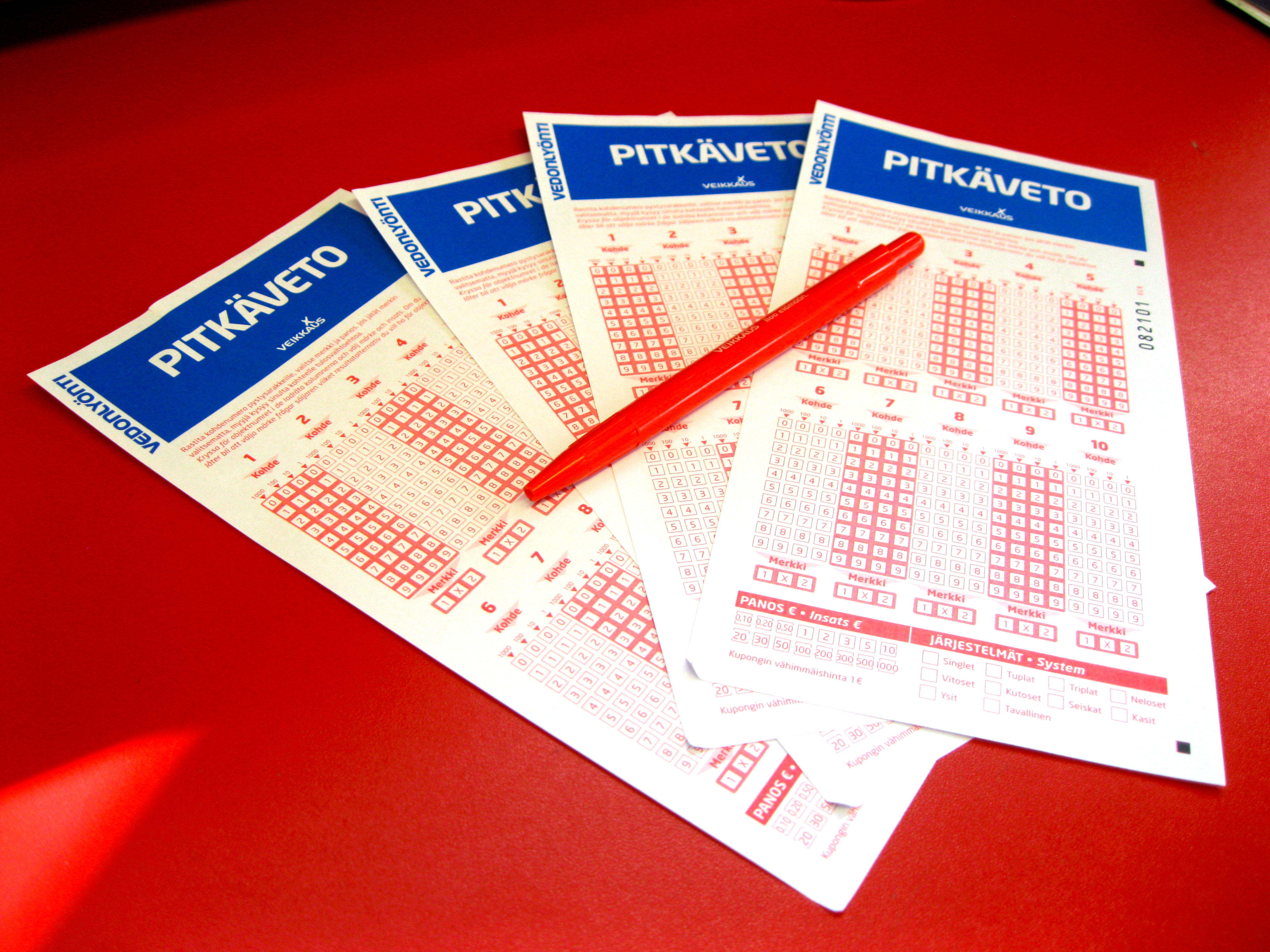 Veikkauksen Pitkäveto kuponkeja.